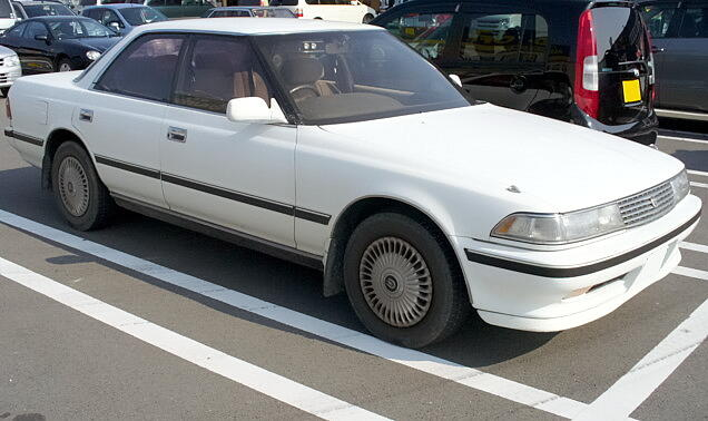 トヨタ・マークII（X80系・ハードトップ）